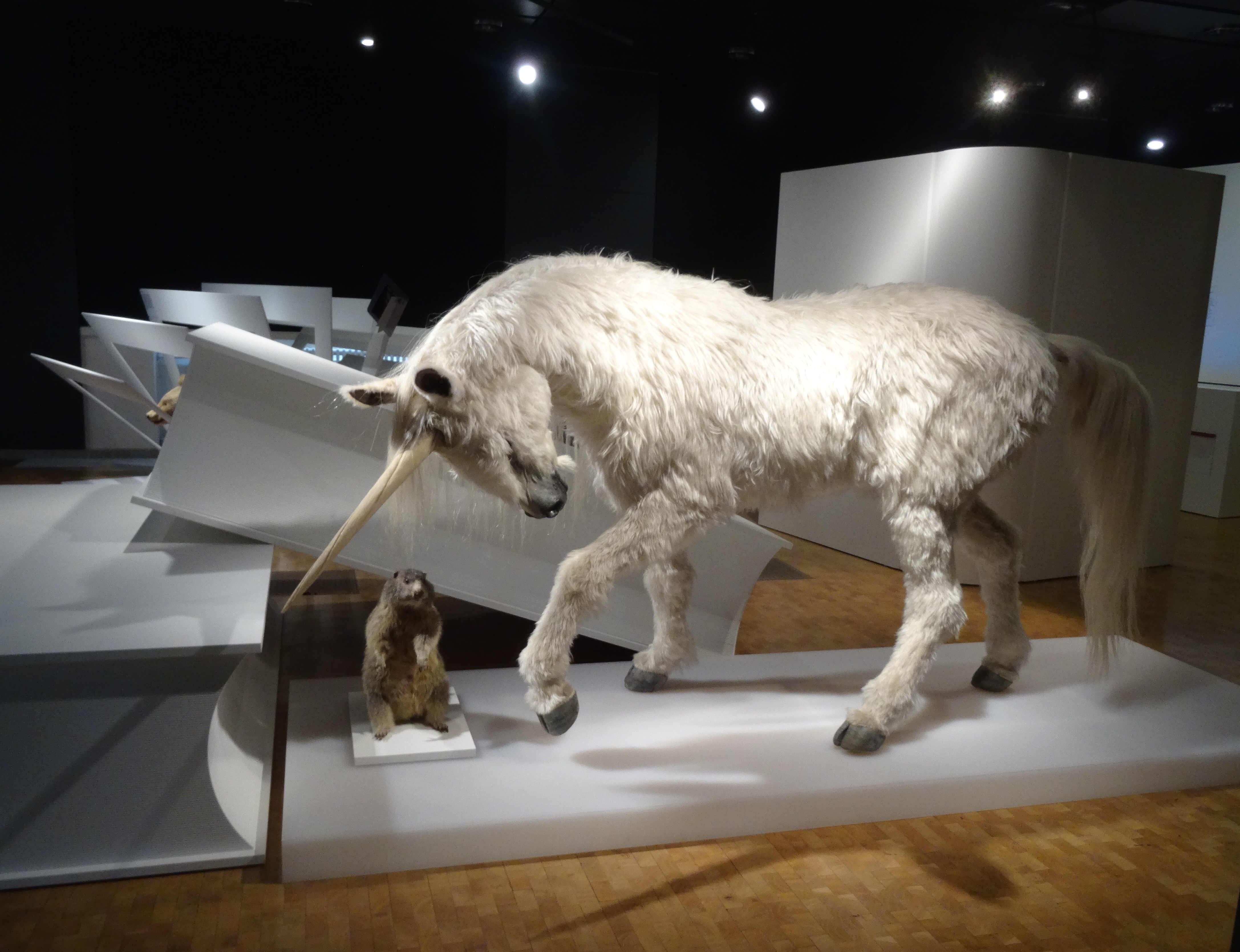 Zoologisches Museum Zürich: Einhorn in der Sonderausstellung Conrad Gessner